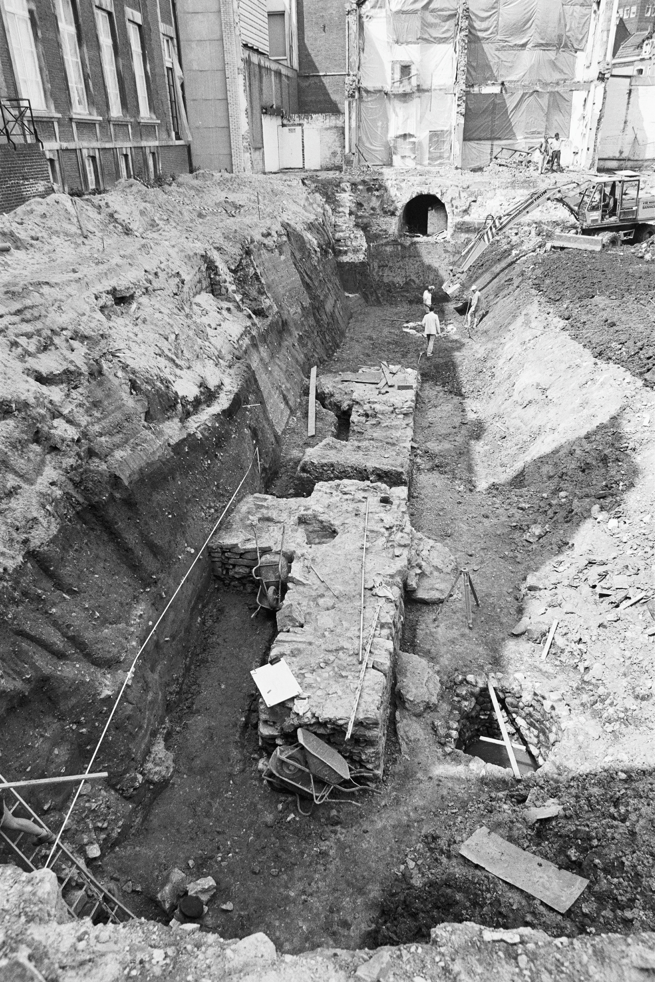 Exterieur OPGRAVINGEN